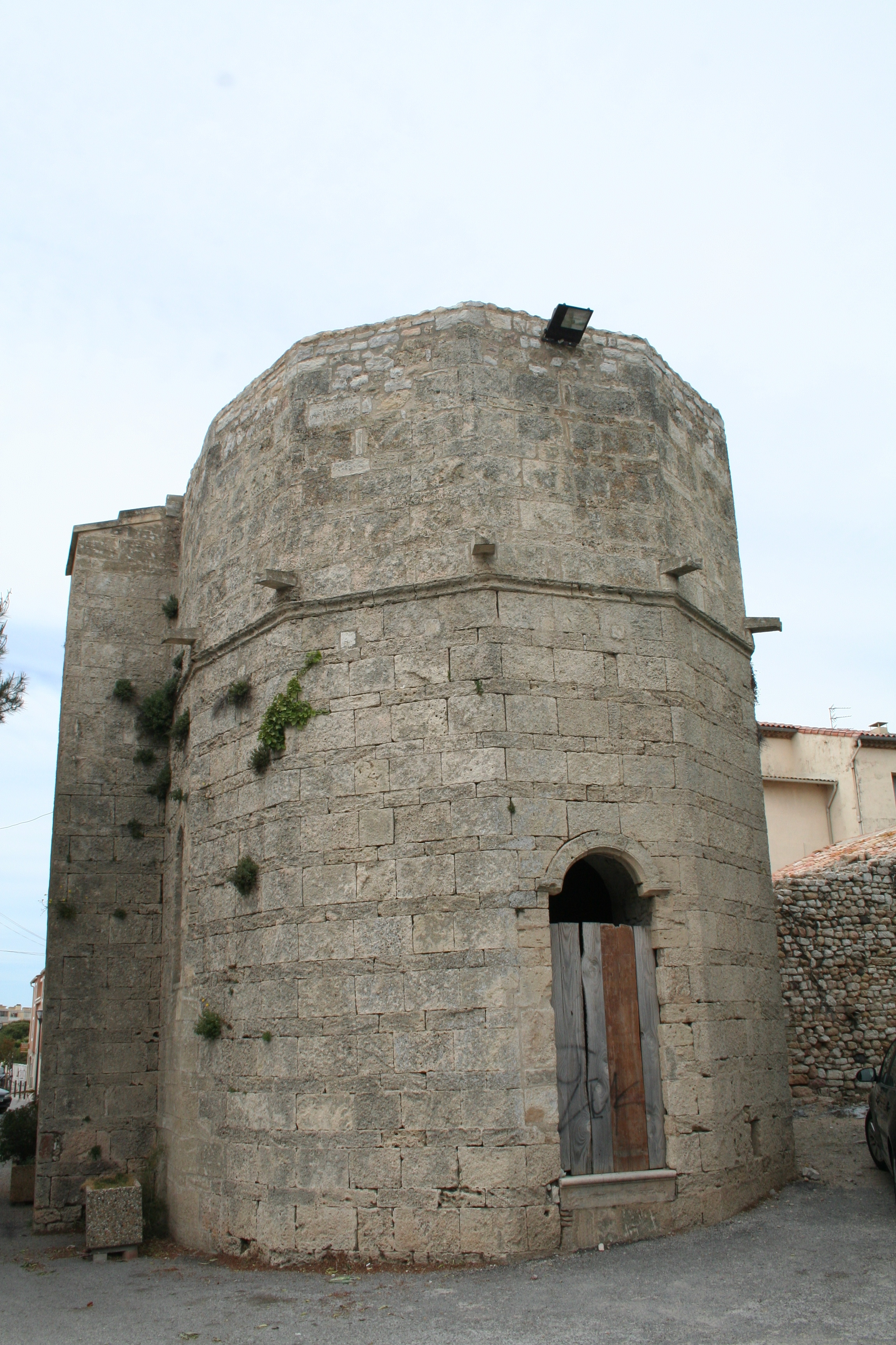 Balaruc-les-Bains (Hérault) - Notre-Dame d'Aix - abside (en Opus monspelliensis)